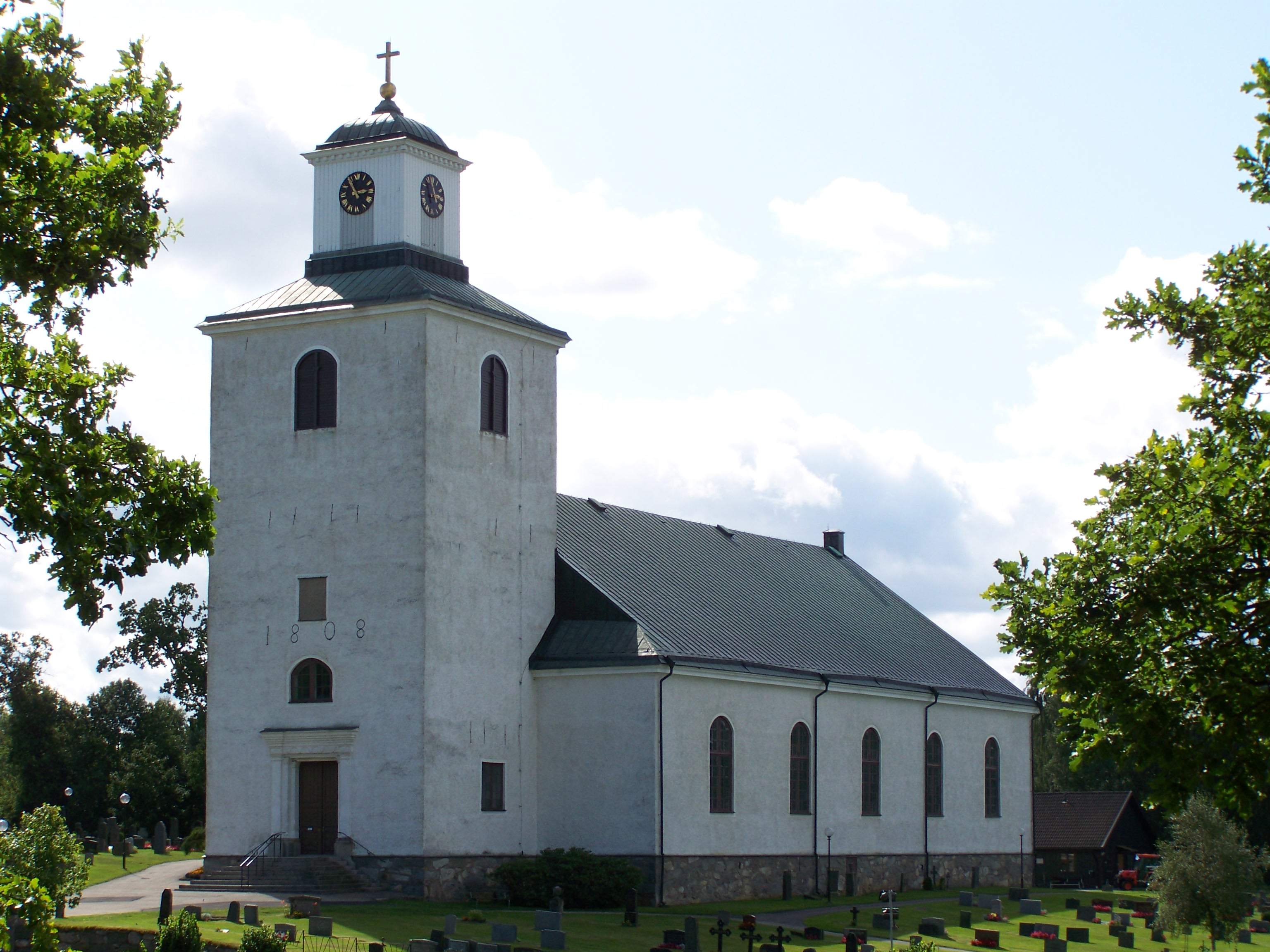 In Schweden. Urshult, Kirche